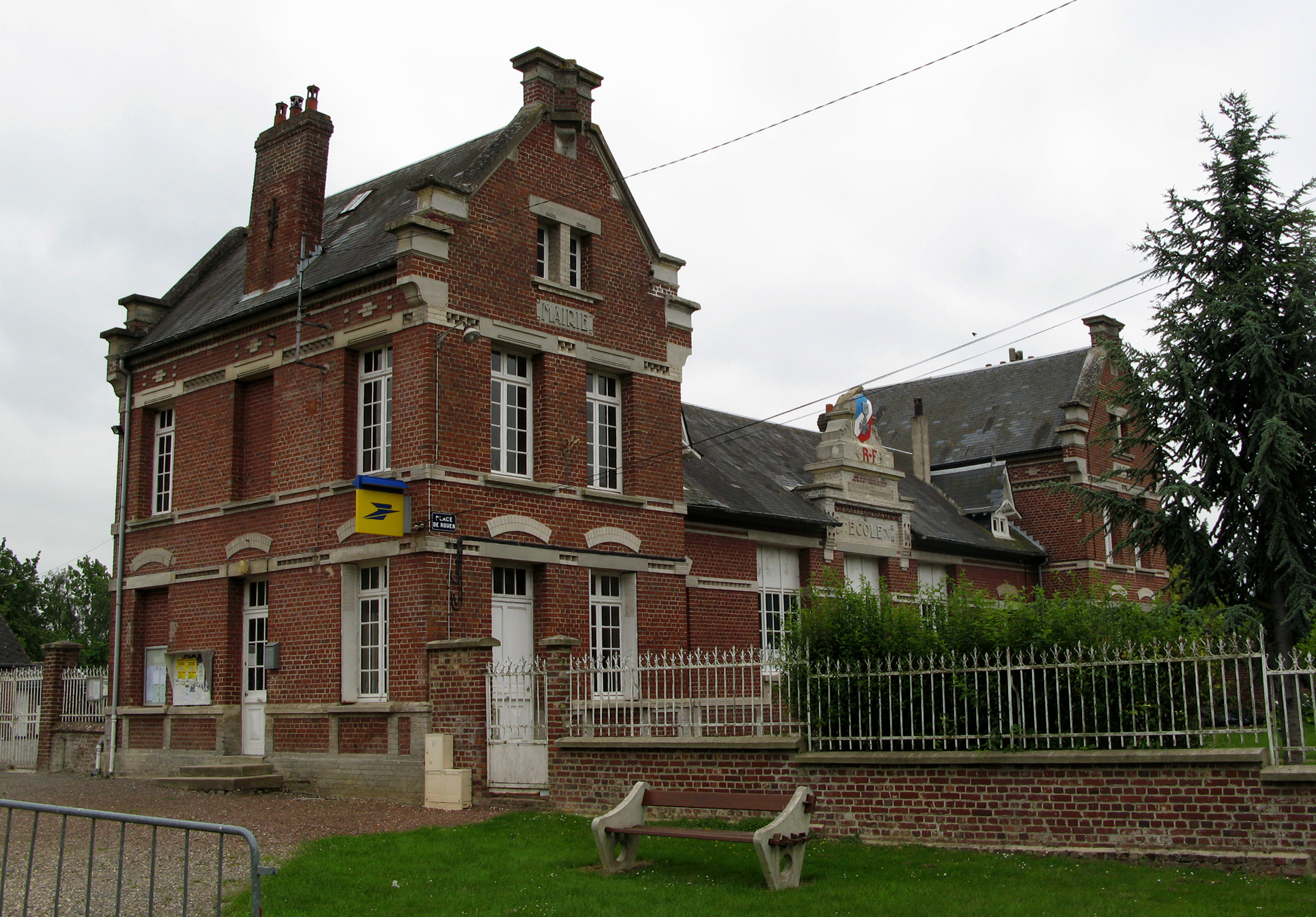 Grivesnes (Somme, France) - La mairie.